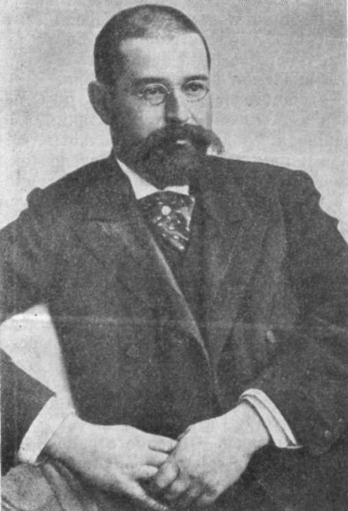 Алексей Андреевич Садовень, заслуженный ординарный профессор Киевского университета, ректор университета в 1917—1918 годах